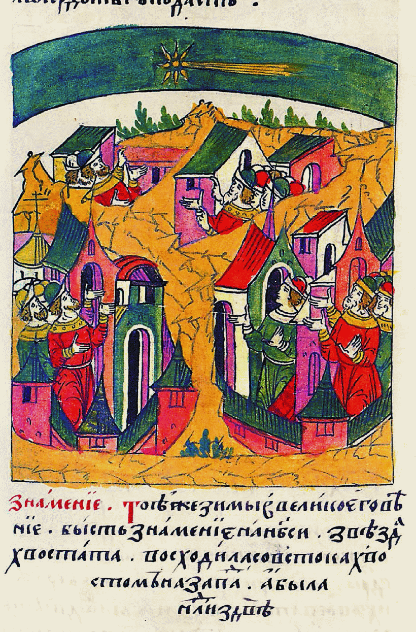 Знамение. Той же зимой, в великий Пост, было знамние на небо: звезда хвостатая восходила с востока, хвостом на запад, а была недели с две